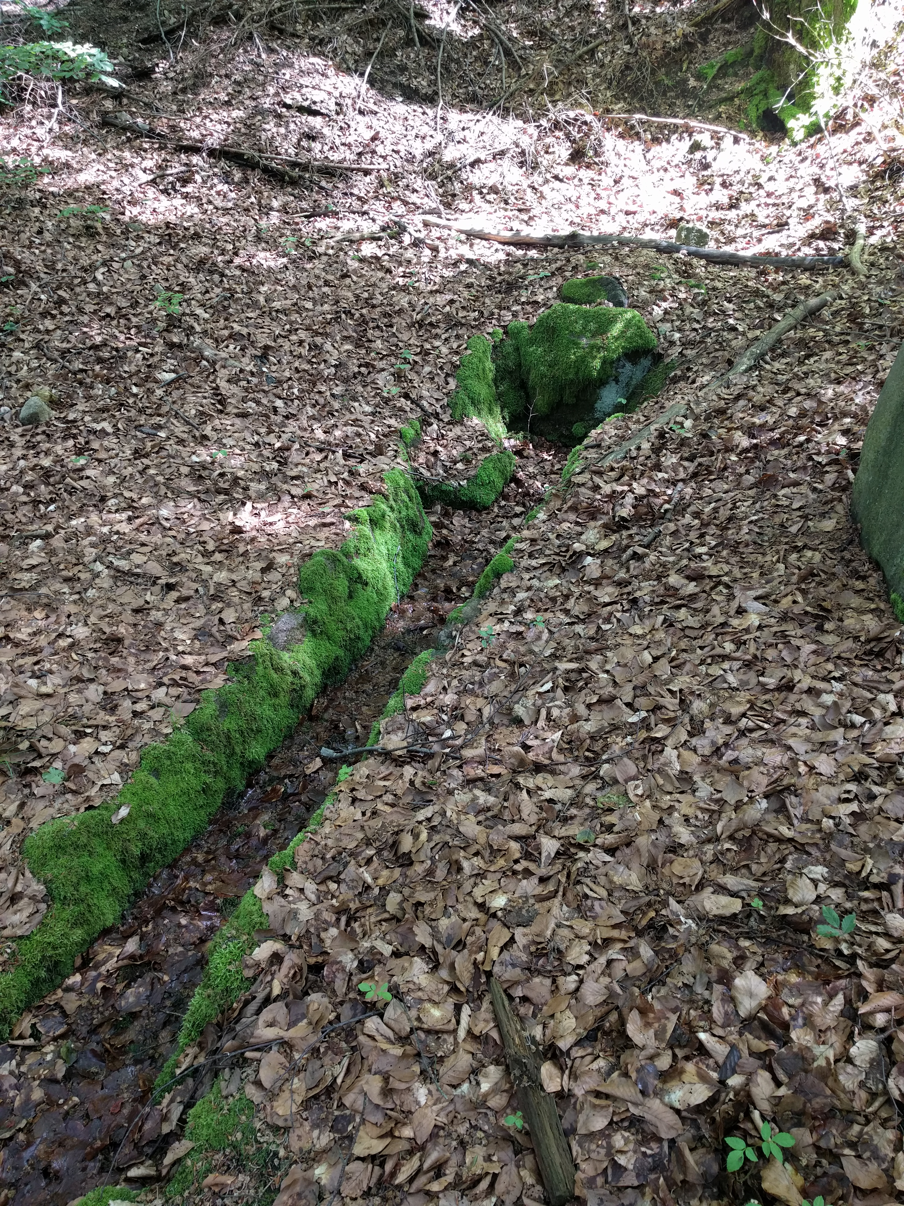 Heiligenbrunnen am Johannisberg